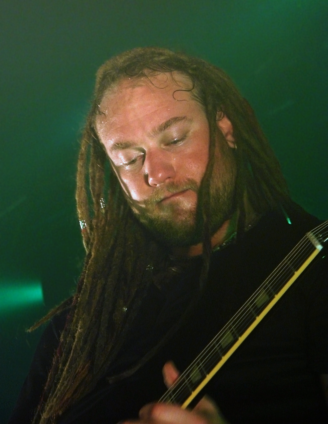 Dark Tanquillity, groupe suédois de Death Metal mélodique, en concert à la Locomotive, à Paris, le 28 Octobre 2008. Martin Henriksson à la guitare.